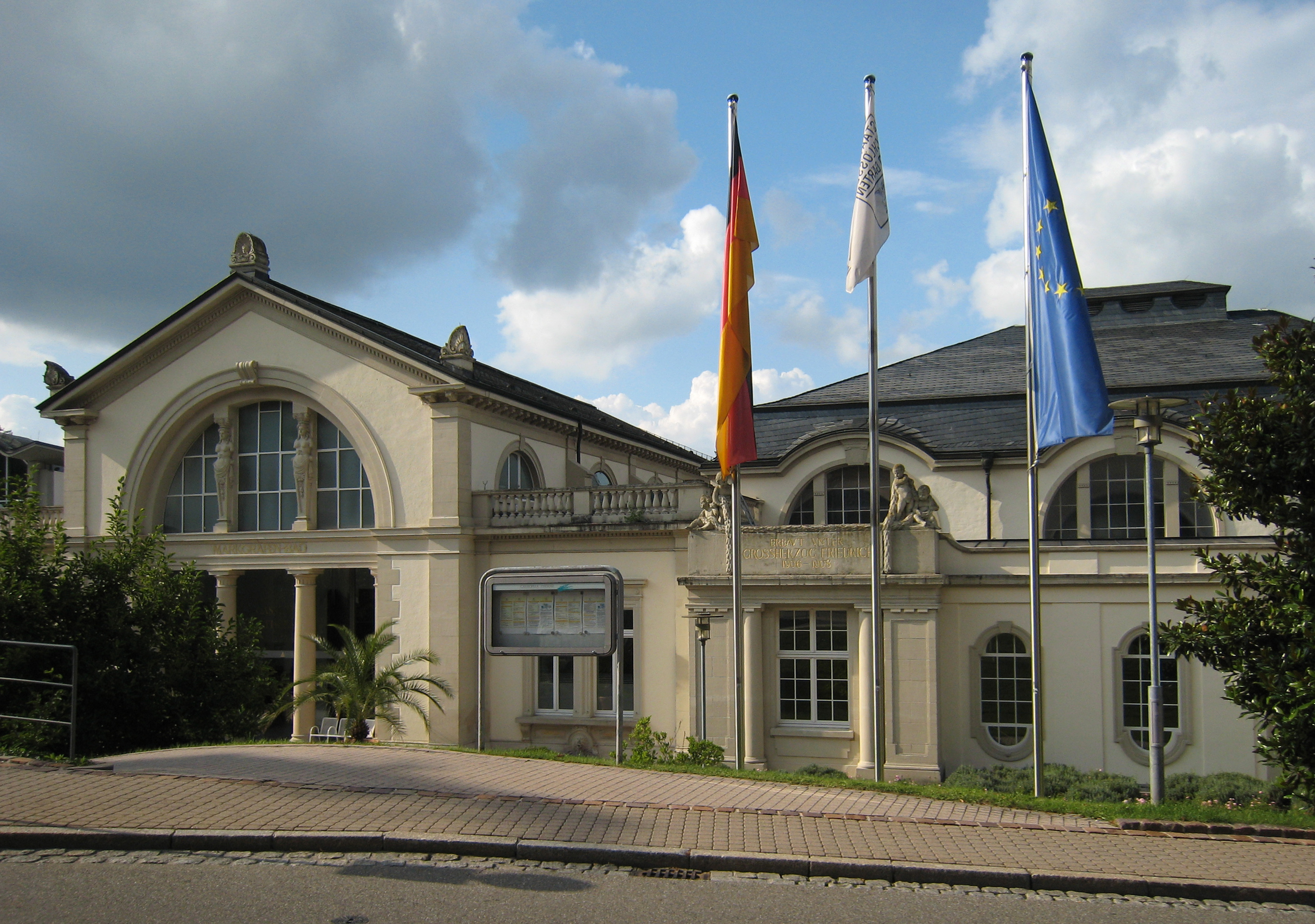 Das im Stil des Klassizismus erbaute Marmorbad firmierte zusammen mit der Erweiterung aus der Zeit des Historismus als Markgrafenbad. Badenweiler/Süd-Schwarzwald/Deutschland